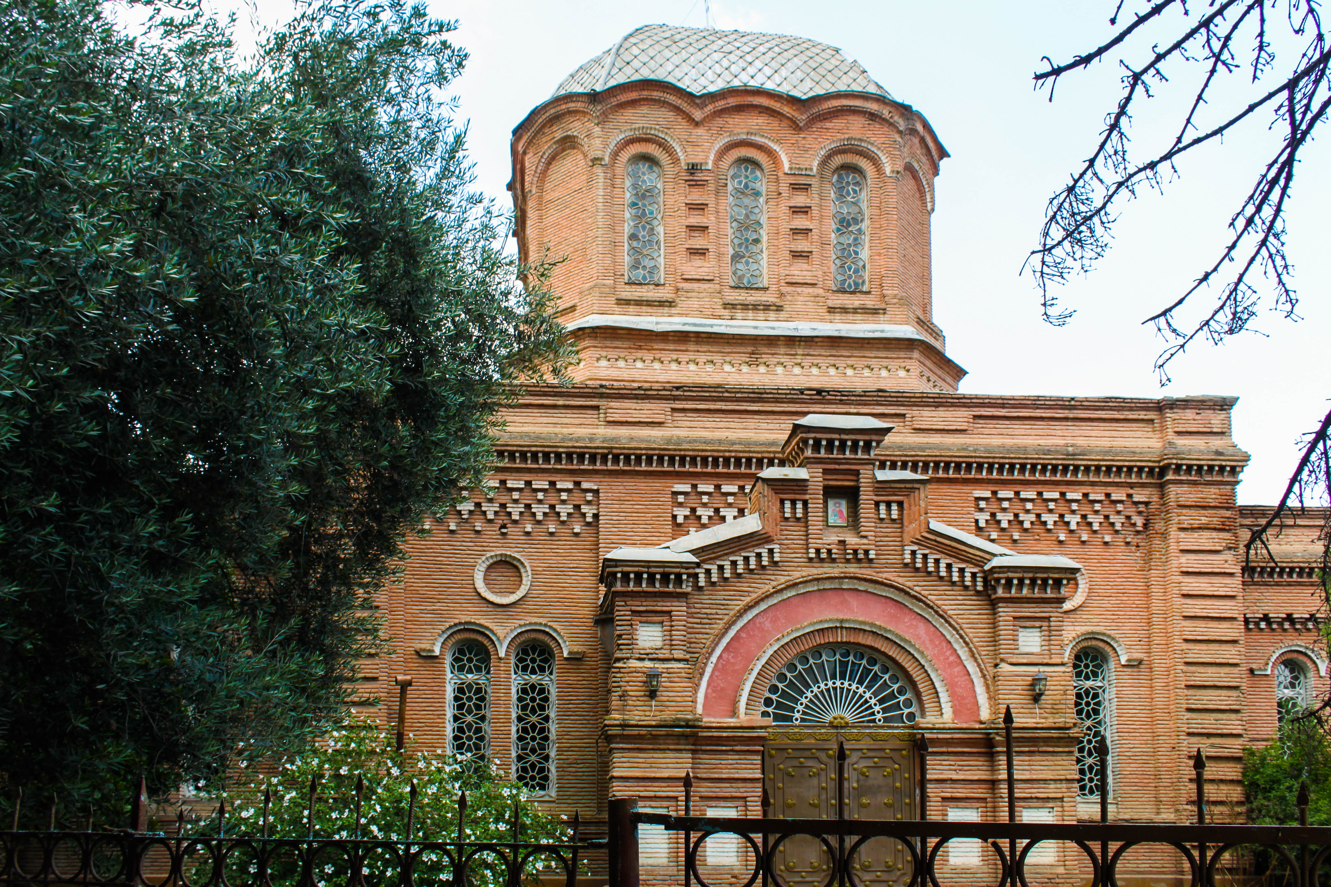 Alexander Nevsky church in Ganja